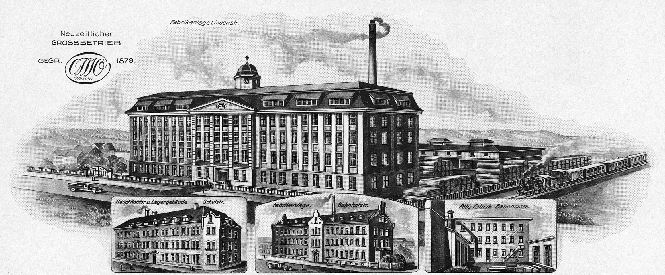 Briefkopf der Kunstmöbelfabrik Otto Weinhold jr mit Fabrikanlagen